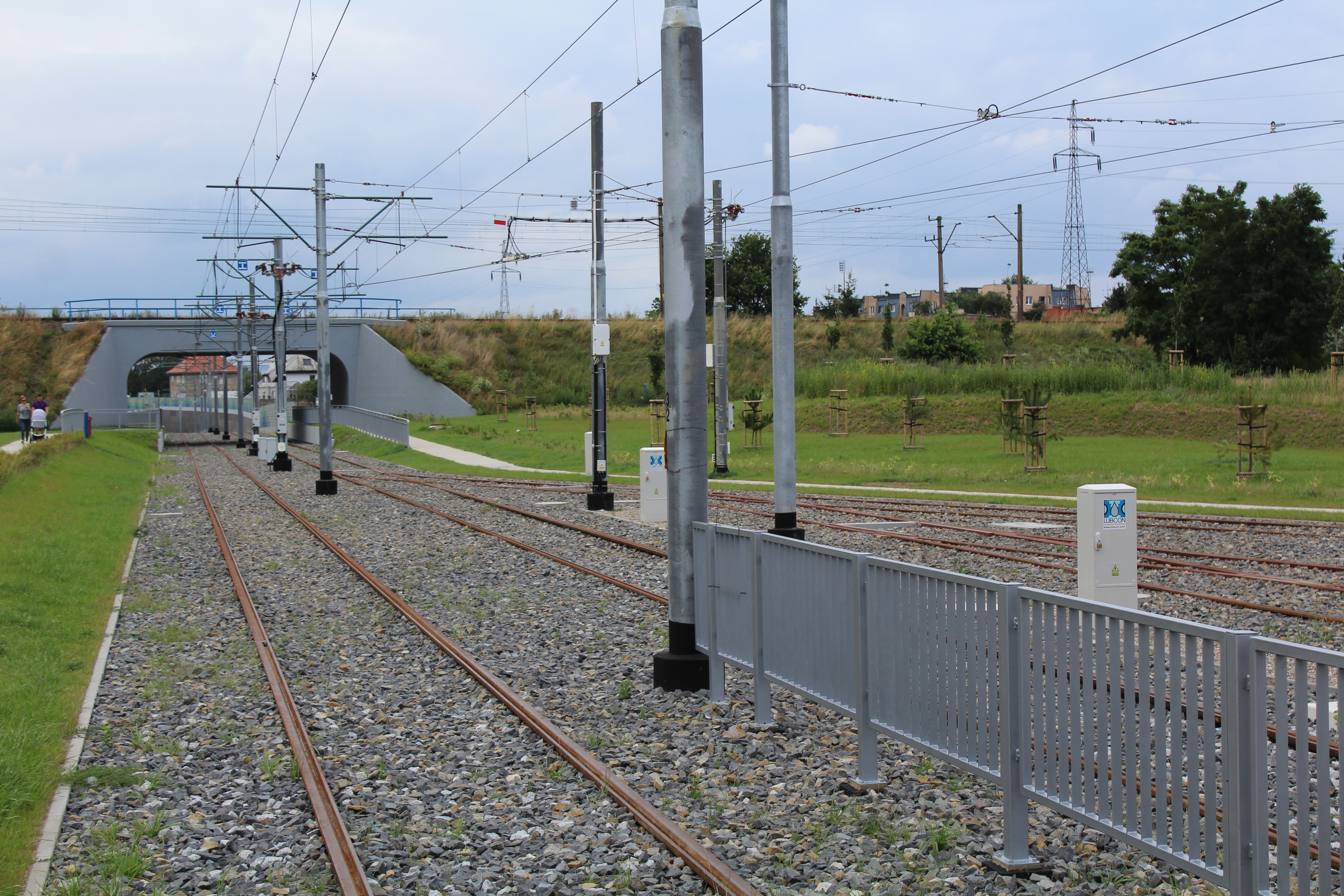 Pętla tramwajowa Turkusowa w Szczecinie